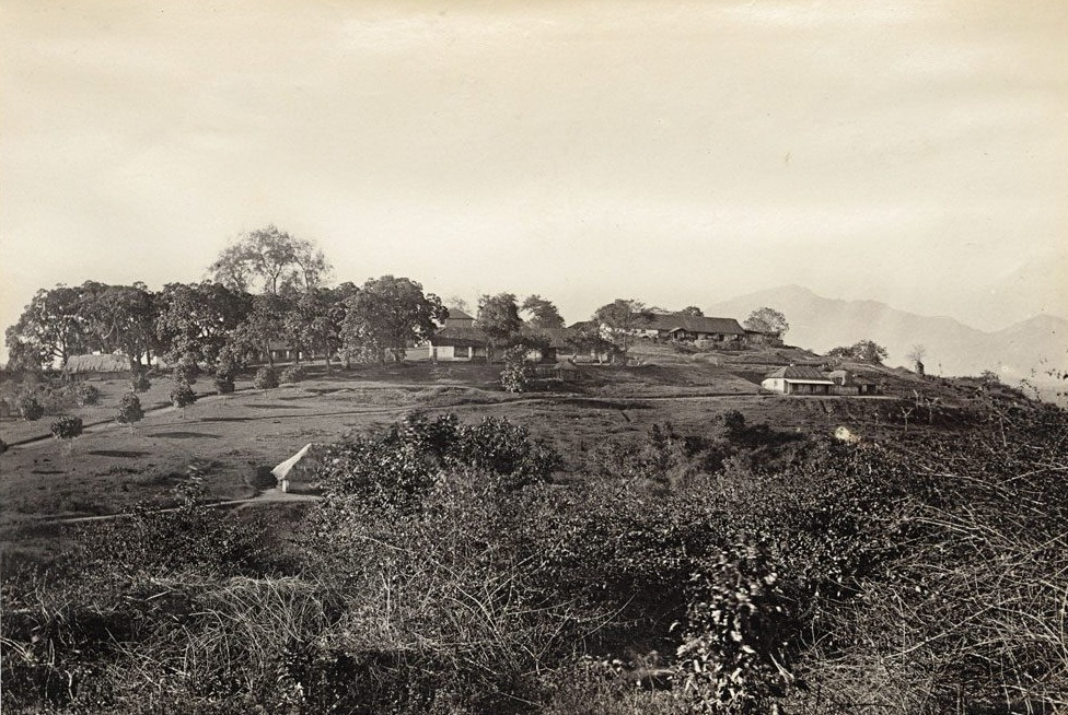 വയനാടിലെ മാനന്തവാടി